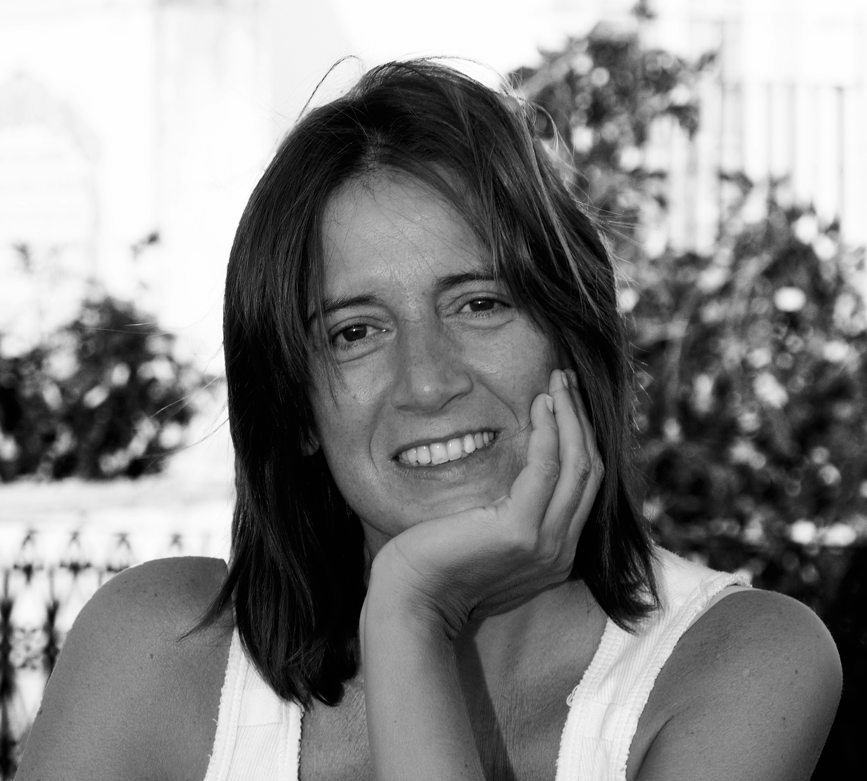 Compositora portuguesa